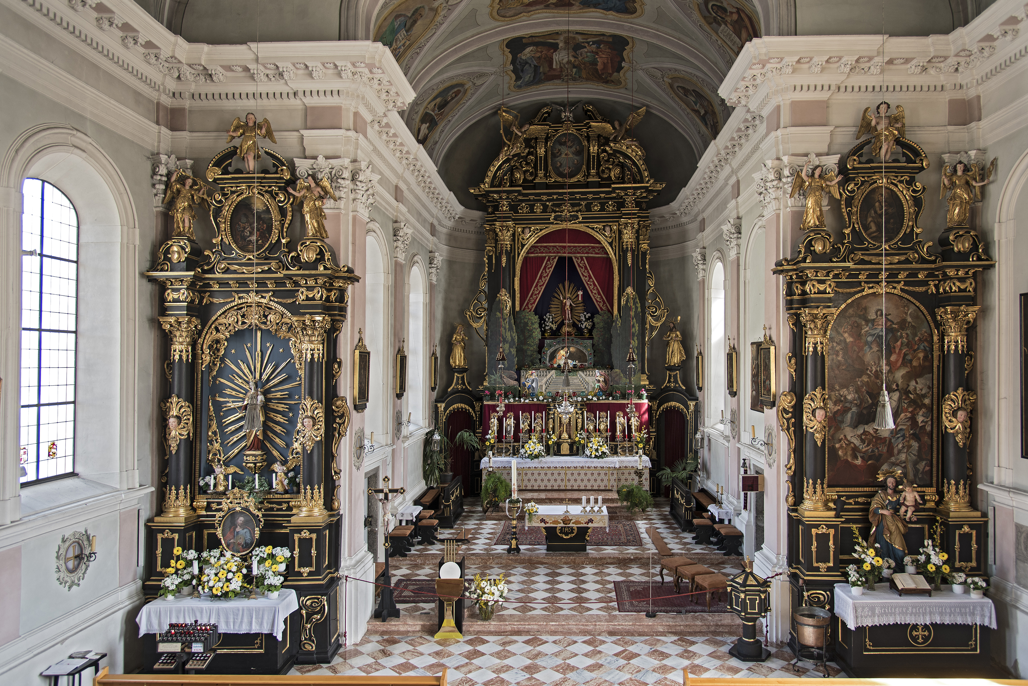 Kath. Pfarrkirche Mariä Himmelfahrt - Innenansicht. Trotz vieler Umbauten ist der Eindruck des Spätbarocks erhalten geblieben, obwohl das Kircheninnere sehr durch klassizistische Änderungen geprägt ist.